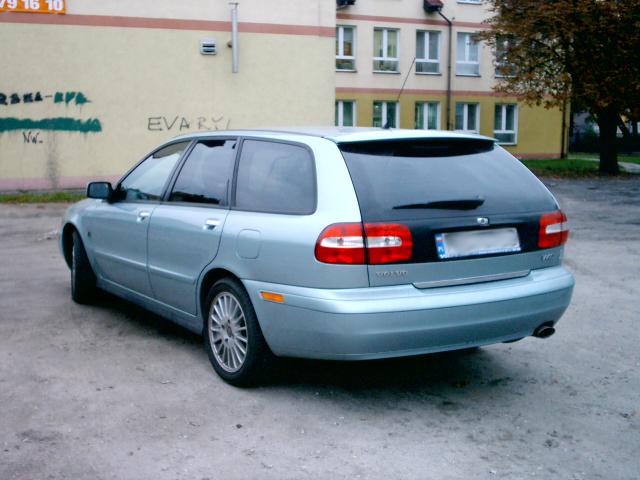 Volvo V40 Back view 24.10.05 Own work